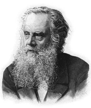 Моншаблон, Альфонс